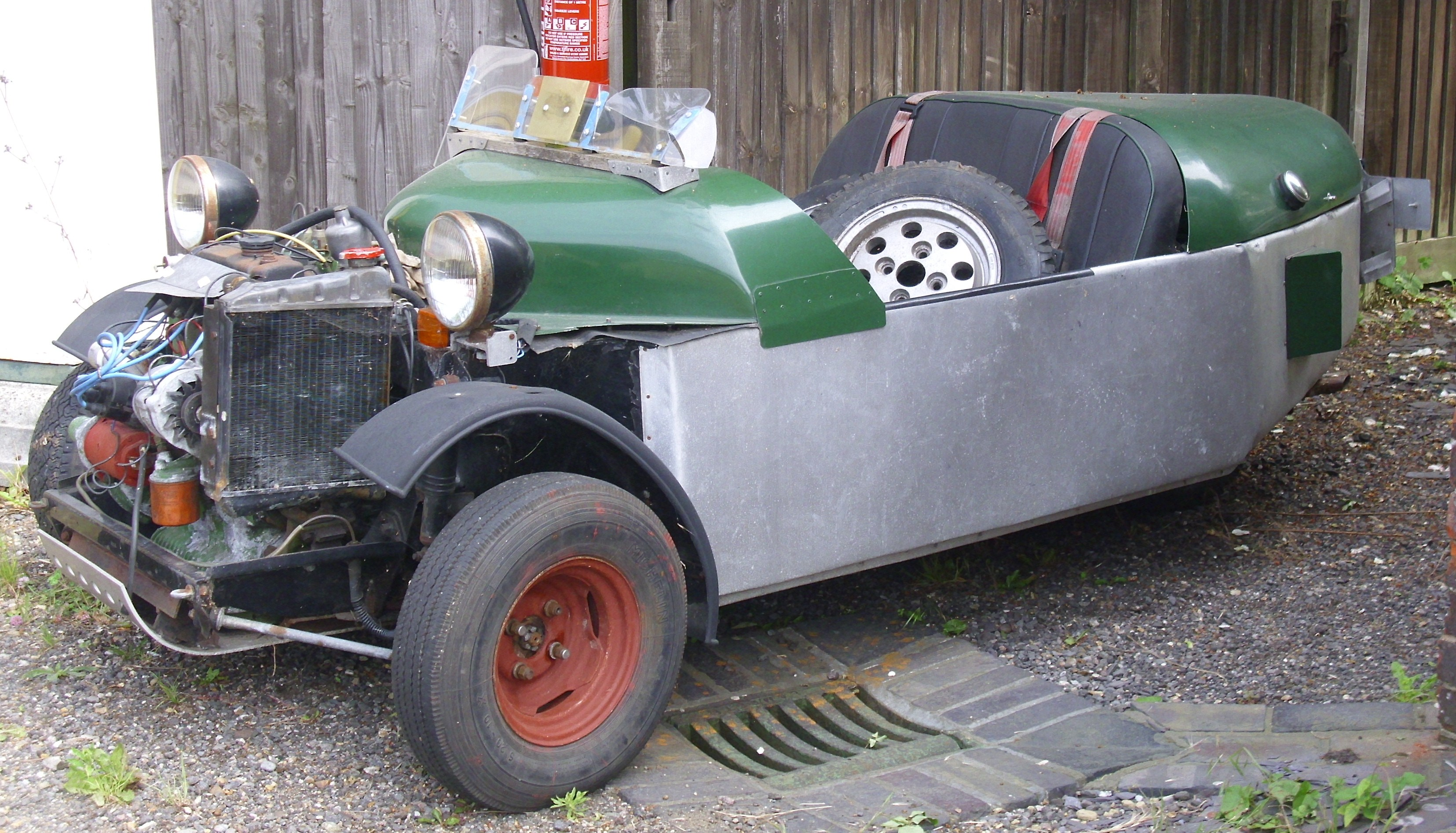 Skip